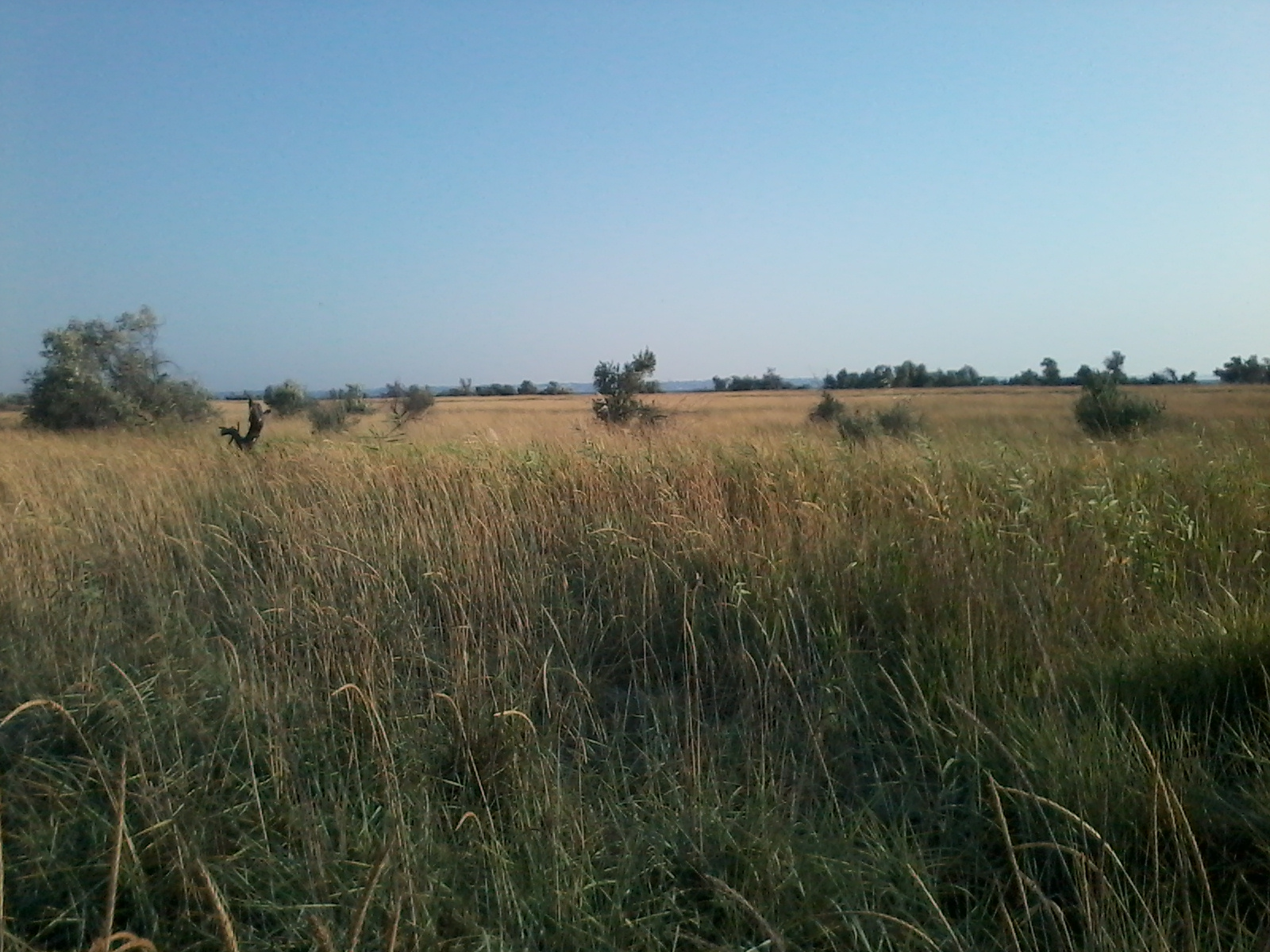 Степова рослинність Кінбурну